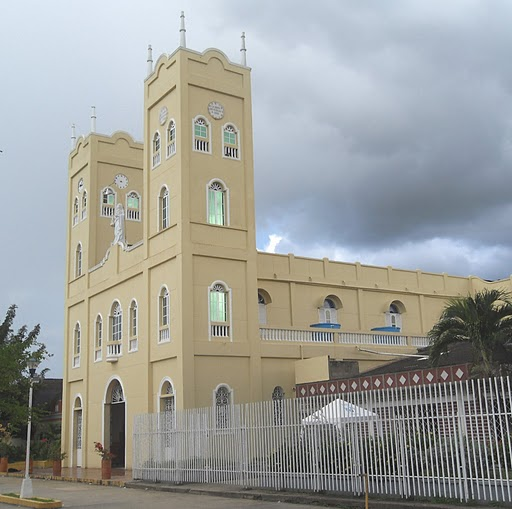 Templo de la Parroquia Nuestra Señora de la Candelaria, en el parque principal del municipio de Planeta Rica